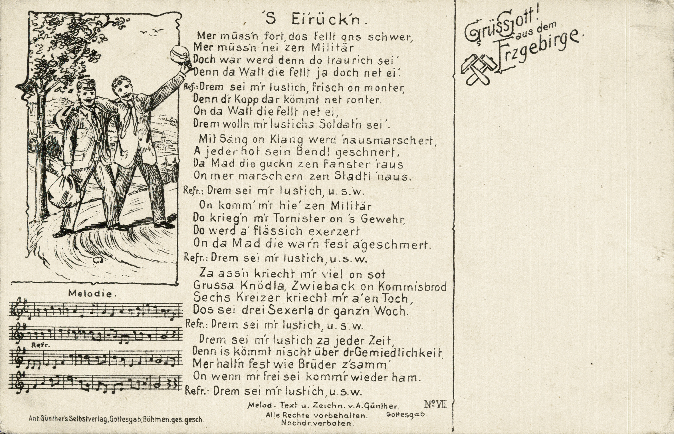 Anton Günther-Liedpostkarte VII - 's Eirück'n ca. 1902